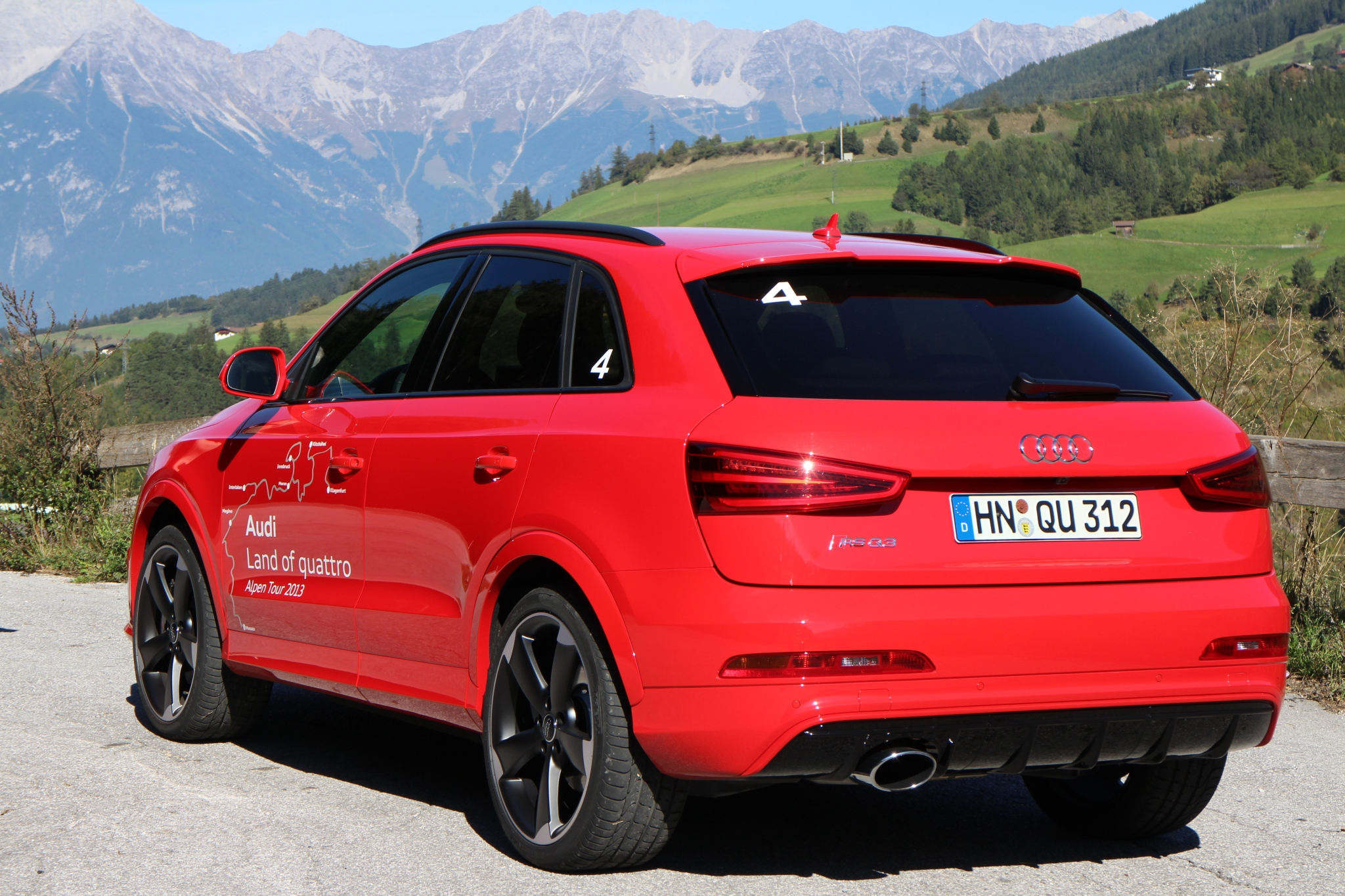 eine Tour durch die schweizer und österreichischen Alpen